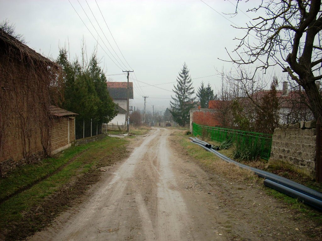 Crkvice